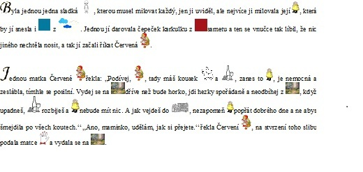 pohádka z obrázků